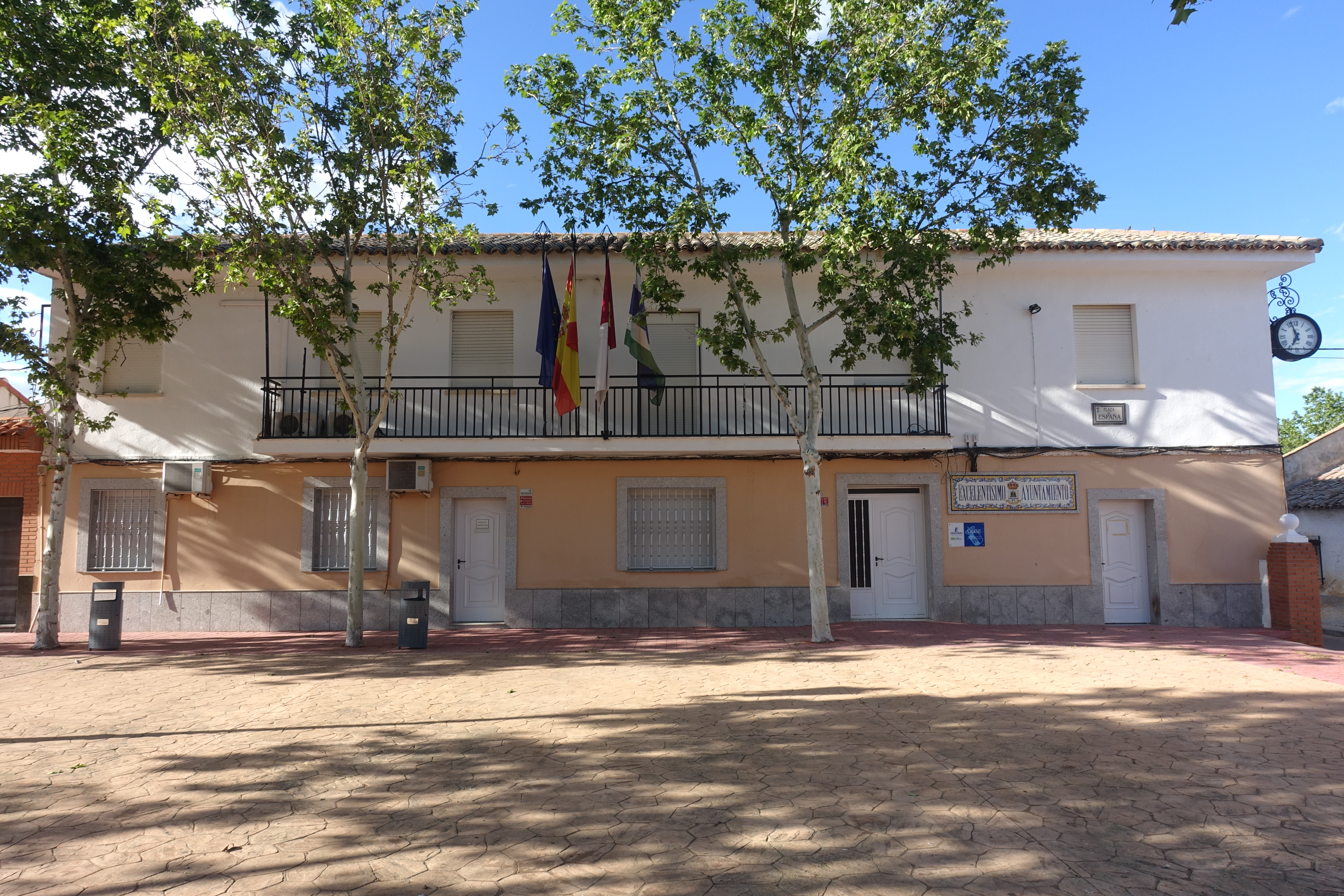 Casa consistorial de Albarreal de Tajo (Toledo, España).